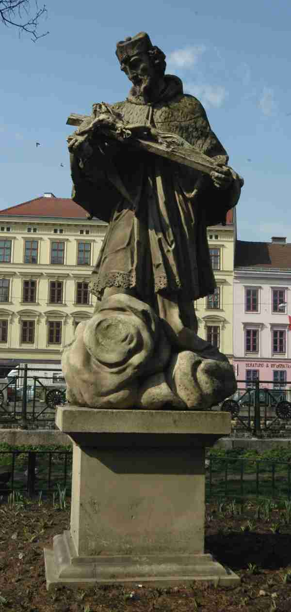 Statue heiliger Johannes von Nepomuk bei Rechte Wienzeile 85 / Pilgramgasse (Wien 5)